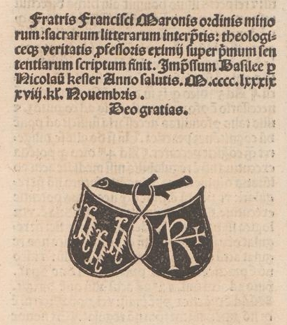 Impressum und Druckerzeichen von Nicolaus Kessler am Schluss von: Franciscus de Maironis: Super primo libro Sententiarum. Nicolaus Kessler, Basel 1489 (Universitätsbibliothek Basel)